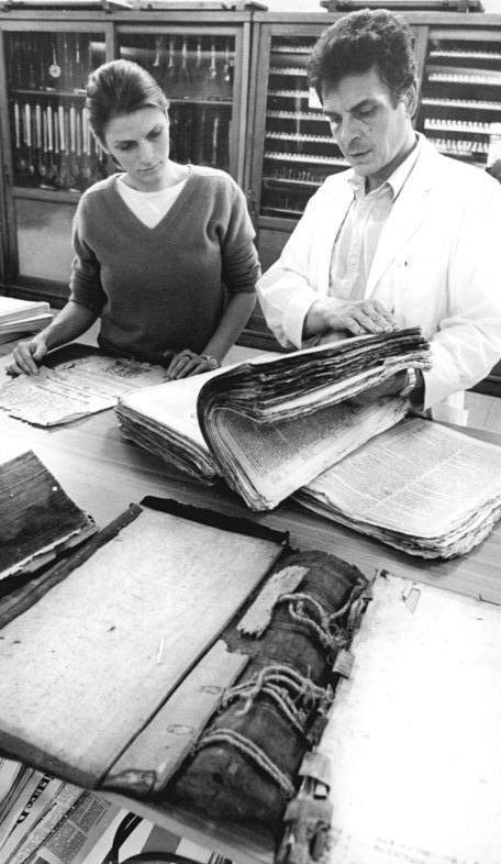 Leipzig, Deutschen Bücherei, Restaurierungswerkstatt Zum Beitrag: Wo eine Bibel gebadet und Zeitungen gespaltet werden - In der Restaurierungswerkstatt der Deutschen Bücherei ADN-ZB Grubitzsch - 22.10.1986 - Dr. Wolfgang Wächter (rechts), der hier mit Barbara Schinko alte Bücher sichtet, die restauriert werden sollen, leitet die Restaurierungswerkstatt der Deutschen Bücherei zu Leipzig. Dr. Wächter hat ein international bekanntes Werk über Buchrestuarierung verfaßt, sein Rat und seine Erfahrung sind weltweit gefragt. (Hierzu gehören die Fotos 1986-1022-300N-304N!)